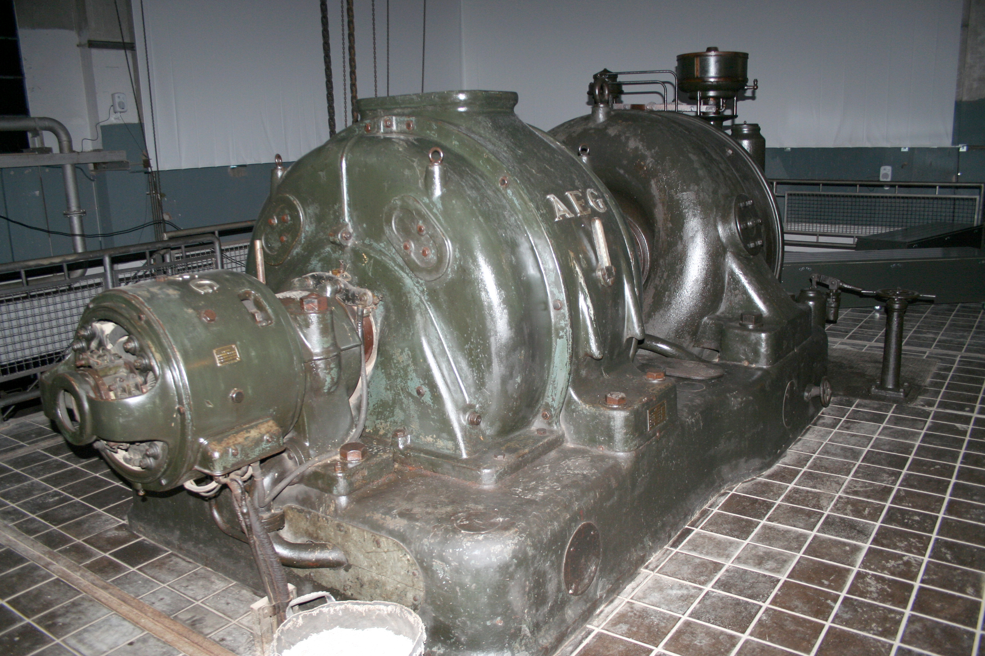 La Tèrmica